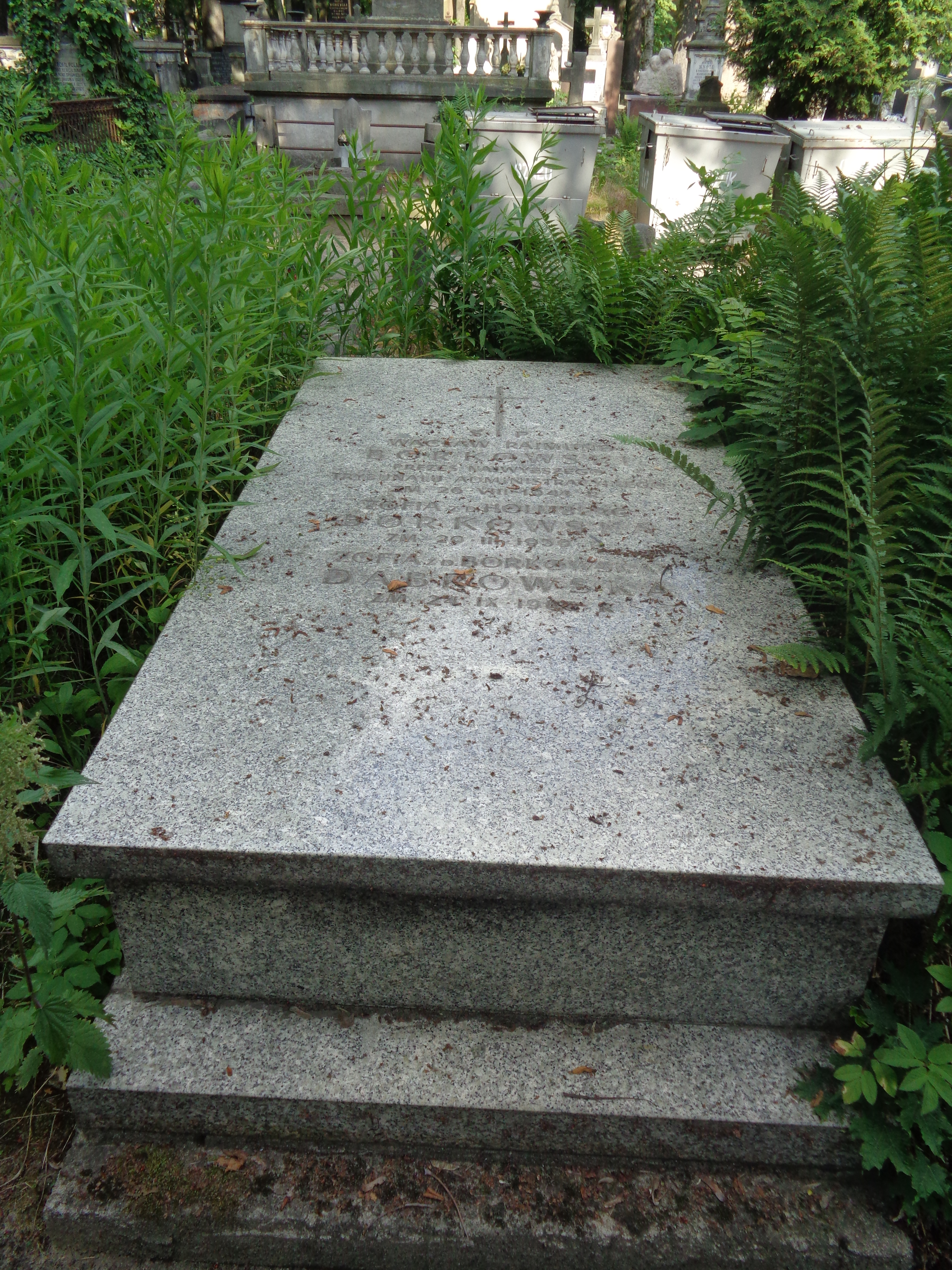 Grób Wacława Borkowskiego na Cmentarzu Powązkowskim